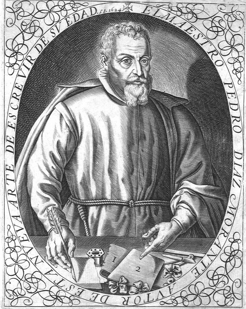 Autor: Diaz Morante, Pedro Descripción bibliográfica: Nueua arte de escreuir inventada con el fabor de Dios / por P[edro] Morante ; con la qual sabran escreuir en muy breue tie[m]po y con gran destreza y gala todos los que con cuenta y cudicia la imitaren y con particularidad hombres y mancebos . - Nueva arte de escrevir. - Madrid : [s.n.], 1615-1631. - [82] h. : il., lám. ; 4º Materia: Escritura - Estudio y enseñanza Materia: Caligrafía Notas: Retrato del autor grab. calc. al principio de la obra . - Álbum facticio compuesto por una serie de láminas de Morante, fechadas entre 1615 y 1631, algunas recortadas y pegadas, con numeración correlativa a mano Lugar de impresión: España. Madrid -Localización: Vea la ilustración en su contexto Libro completo